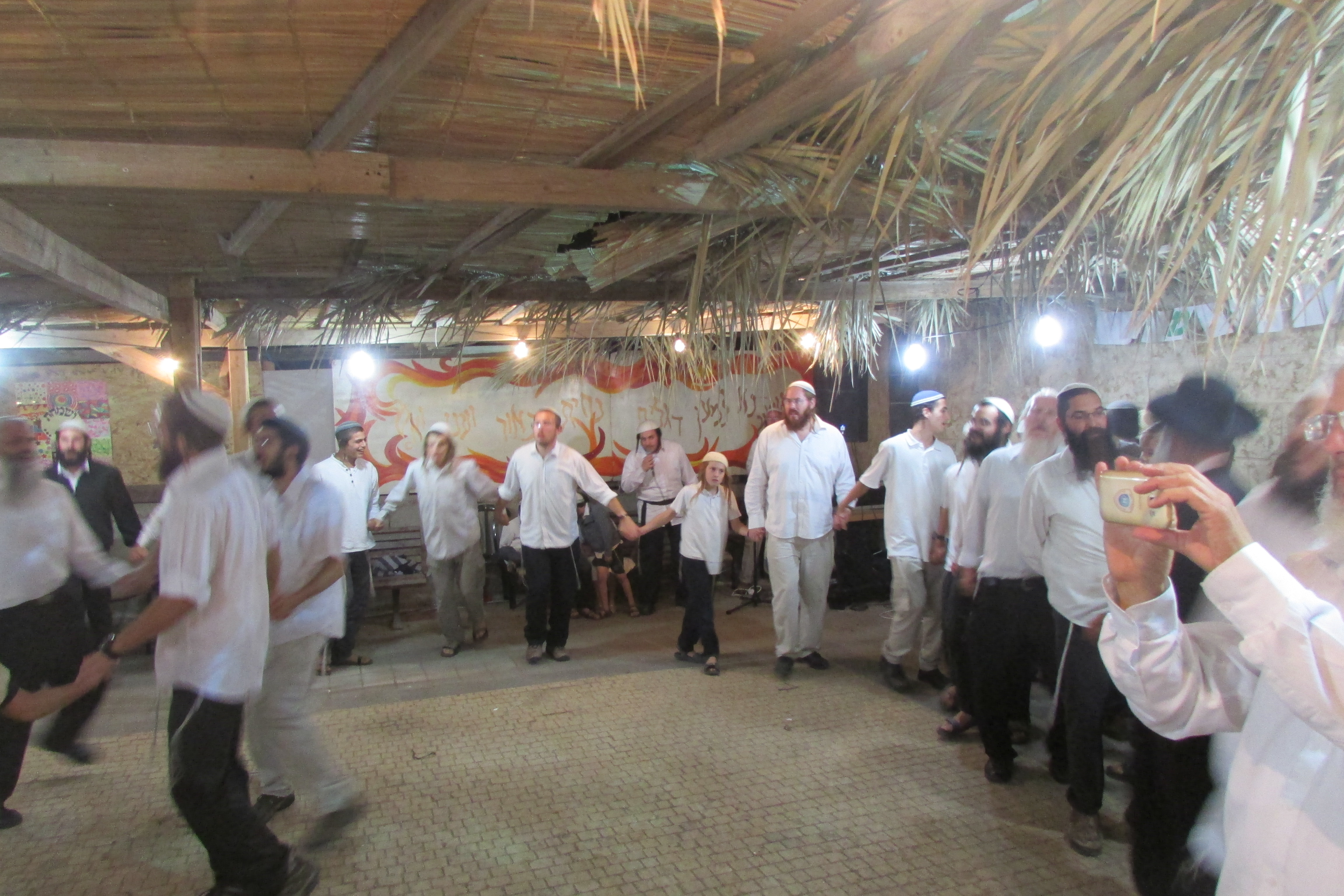 Simchat Beit Hashoeva in Yitzhar